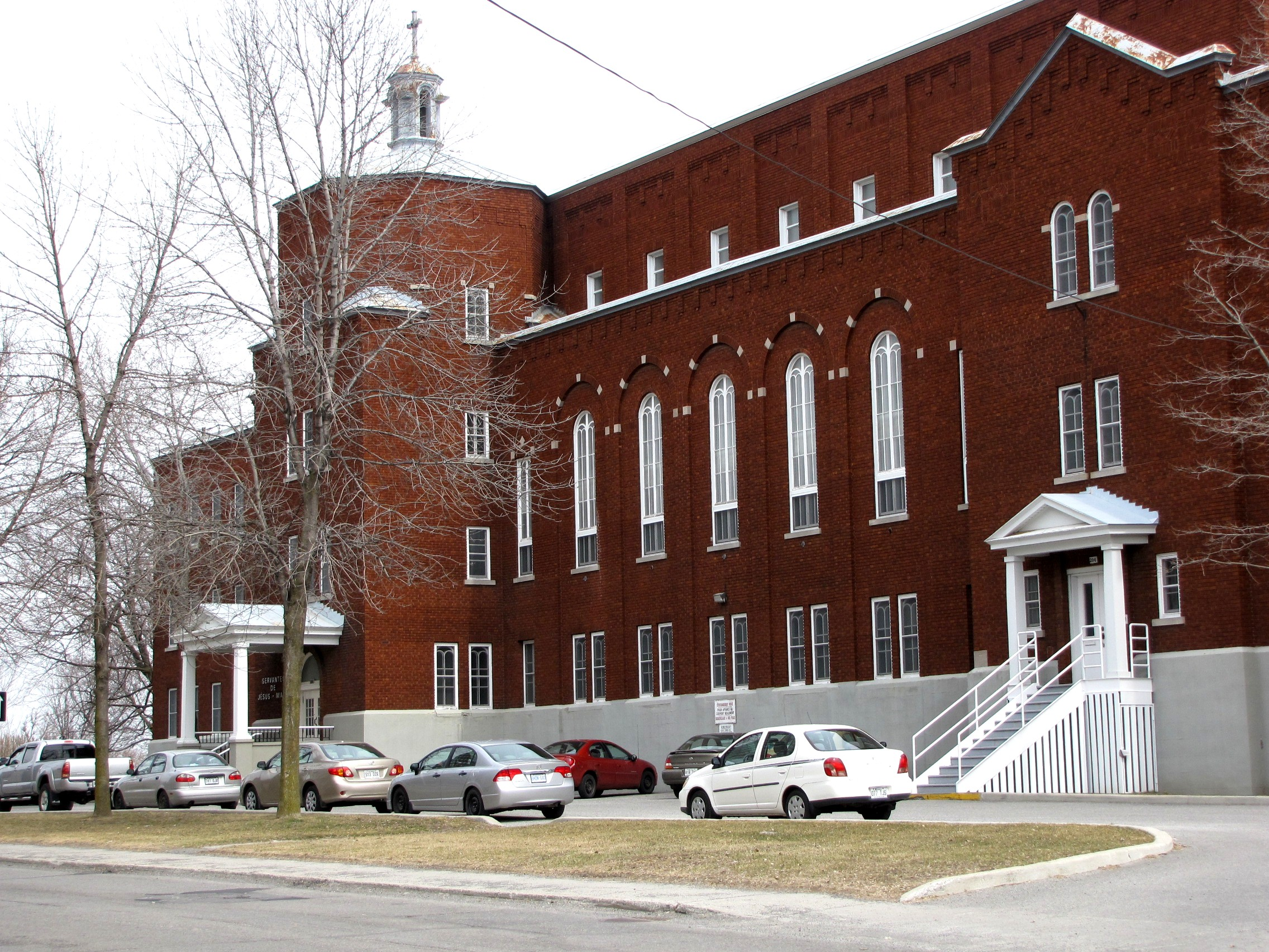 Le Couvent des Servantes de Jésus-Marie est situé sur la rue Laurier dans le secteur Hull à Gatineau, Qc. Il est également le lieu ou le Pape Jean-Paul II s'est arrêté lors de sa première visite au Canada et au Québec.